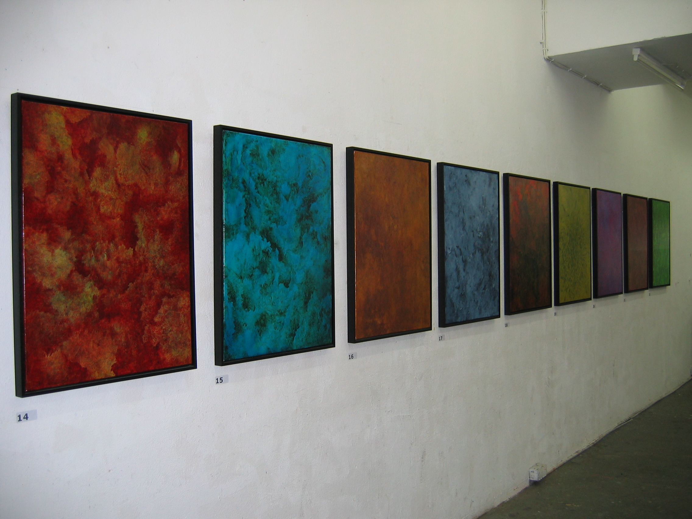 Leinwände in Schattenfugen-Rahmen: Öllasuren auf Leinwand, neunteilige Serie (jew. 60 x 80 cm). Foto der Ausstellung zusammenhängend im artefact (August 2005), Bonn